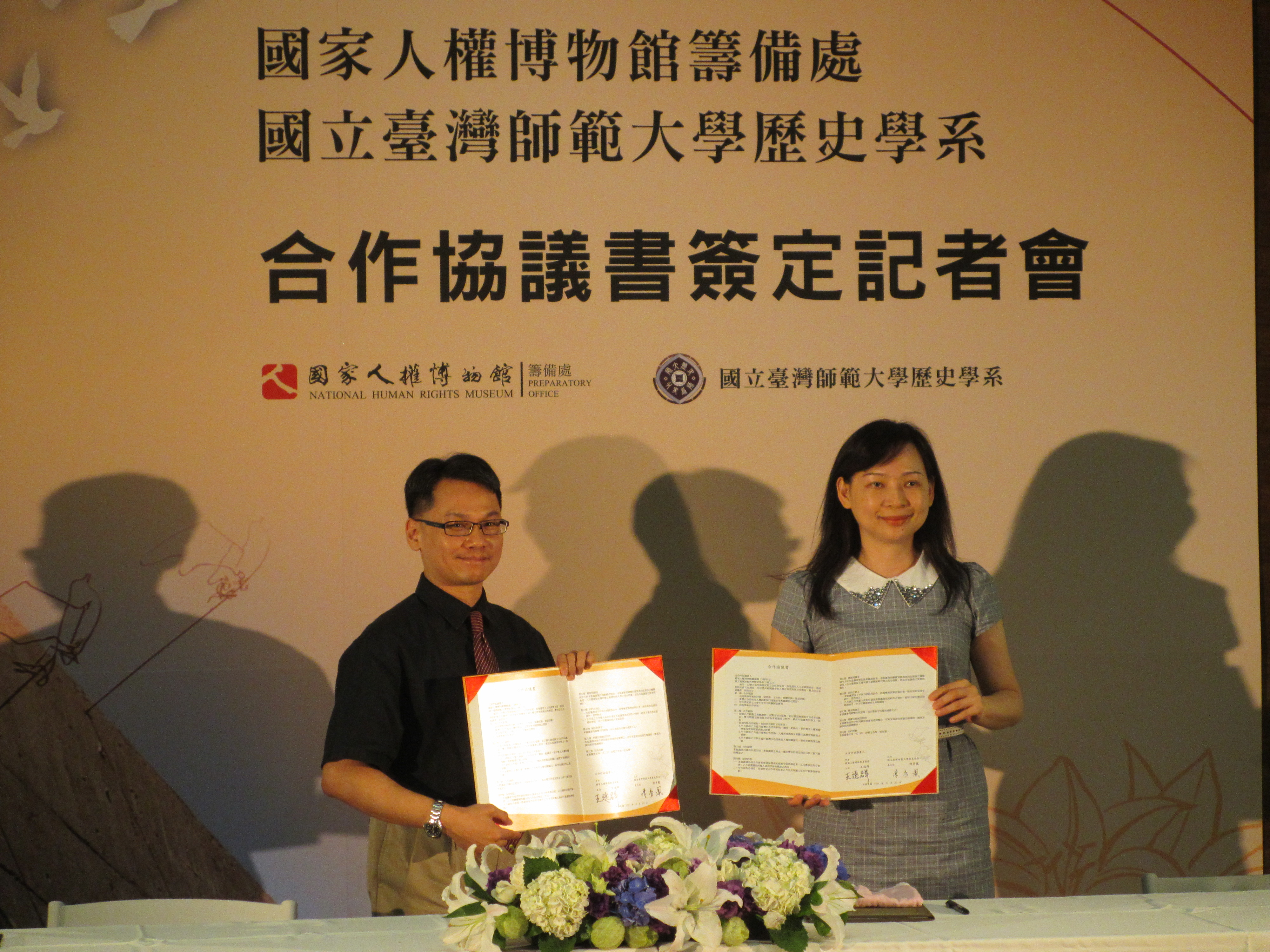 國家人權博物館籌備處與國立臺灣師範大學歷史學系，於國立臺灣師範大學誠101教室舉辦合作協議書簽定記者會。左起：國家人權博物館籌備處主任王逸群、國立臺灣師範大學歷史學系主任陳秀鳳。